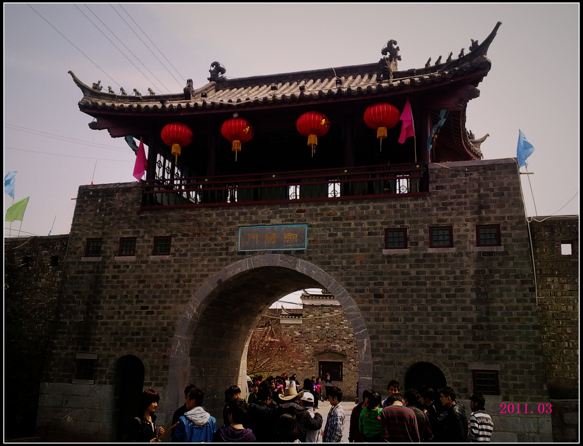 三河古镇朝阳楼